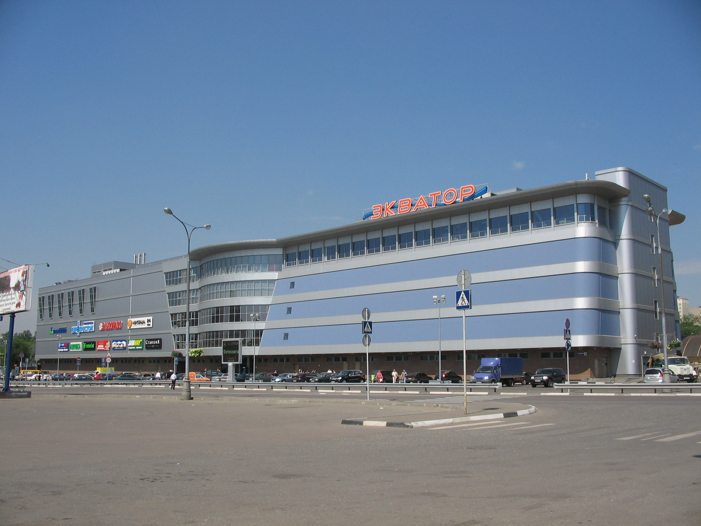 Город Реутов, торговый центр «Экватор».